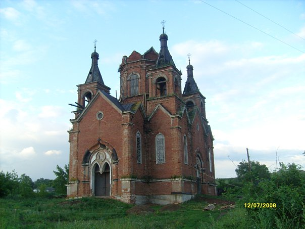 2011 год